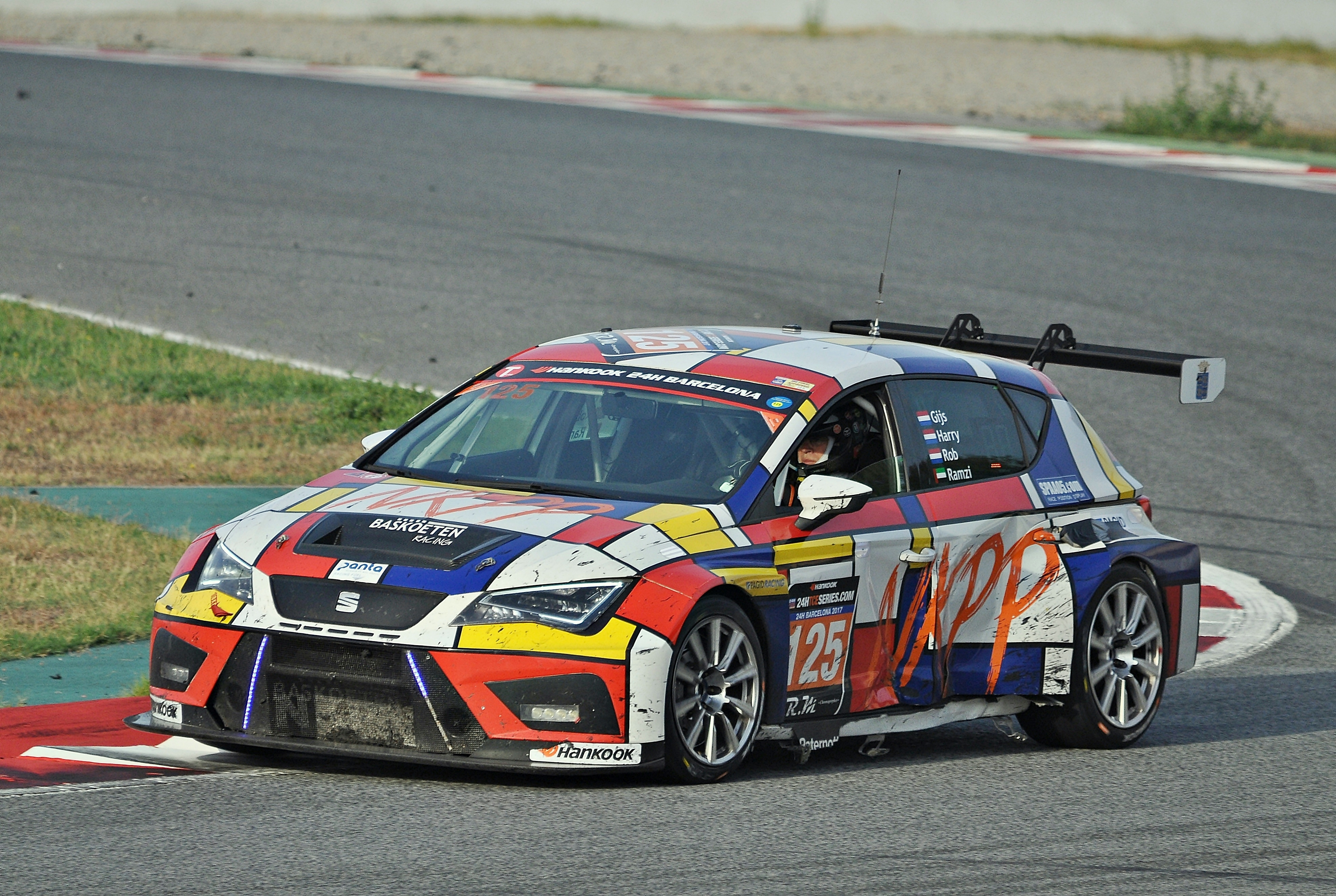 24 Horas de Barcelona 2017